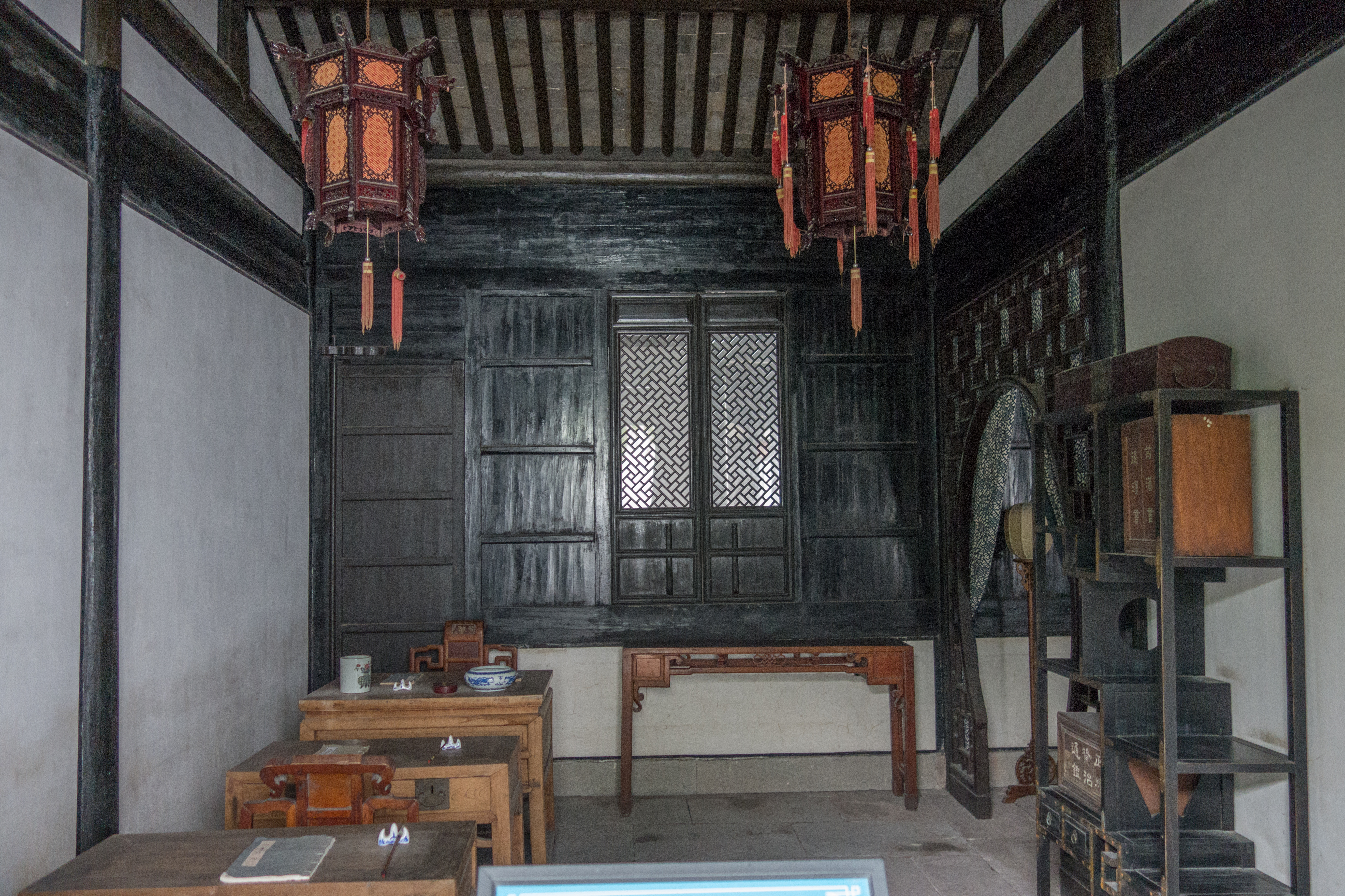 余姚王守仁故居